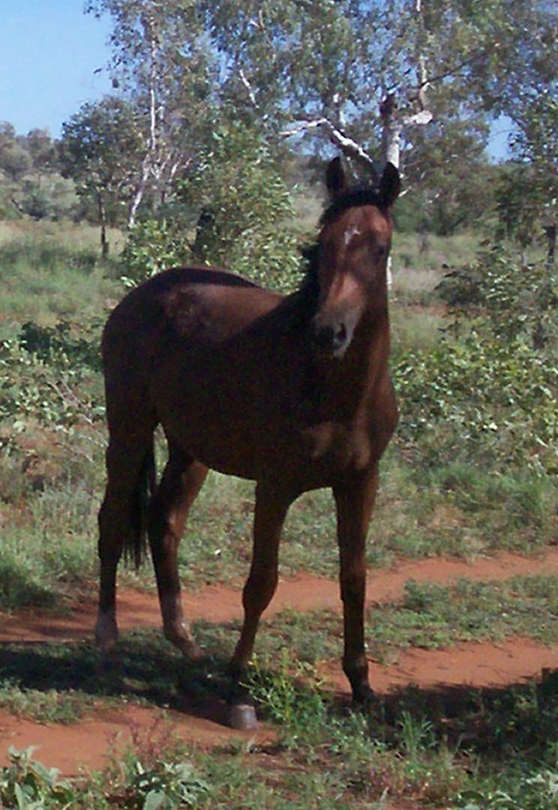 Photo, Ausschnitt aus Image:Brumbies.jpg by User:DRyan